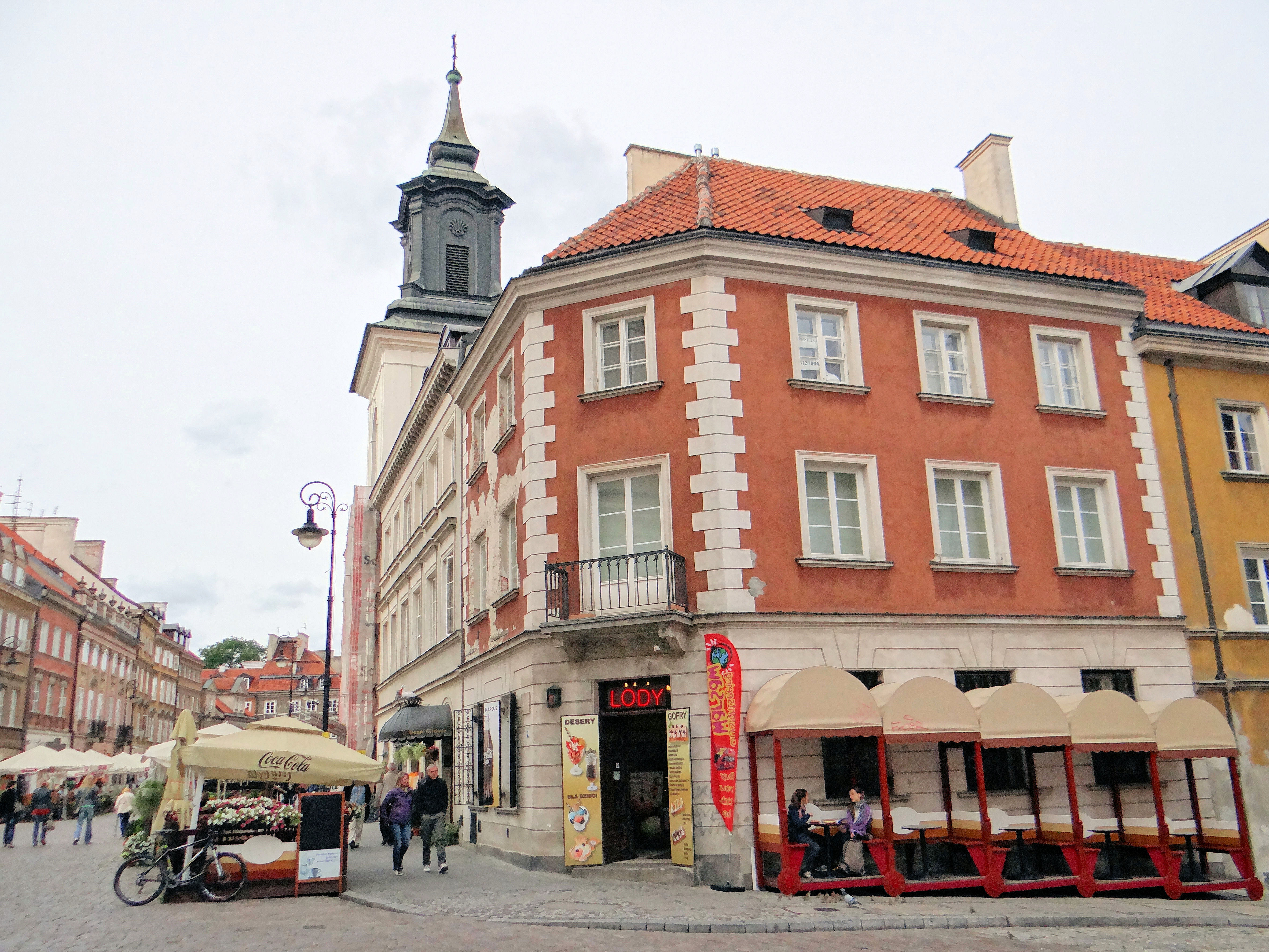 Kamienica narożna przy ul Freta 2 i Mostowej, w głębi wieża dzwonnicy u św Jacka i fragment zachodniej pierzei ul Freta biegnącej na północ w kierunku ul Świętojerskiej